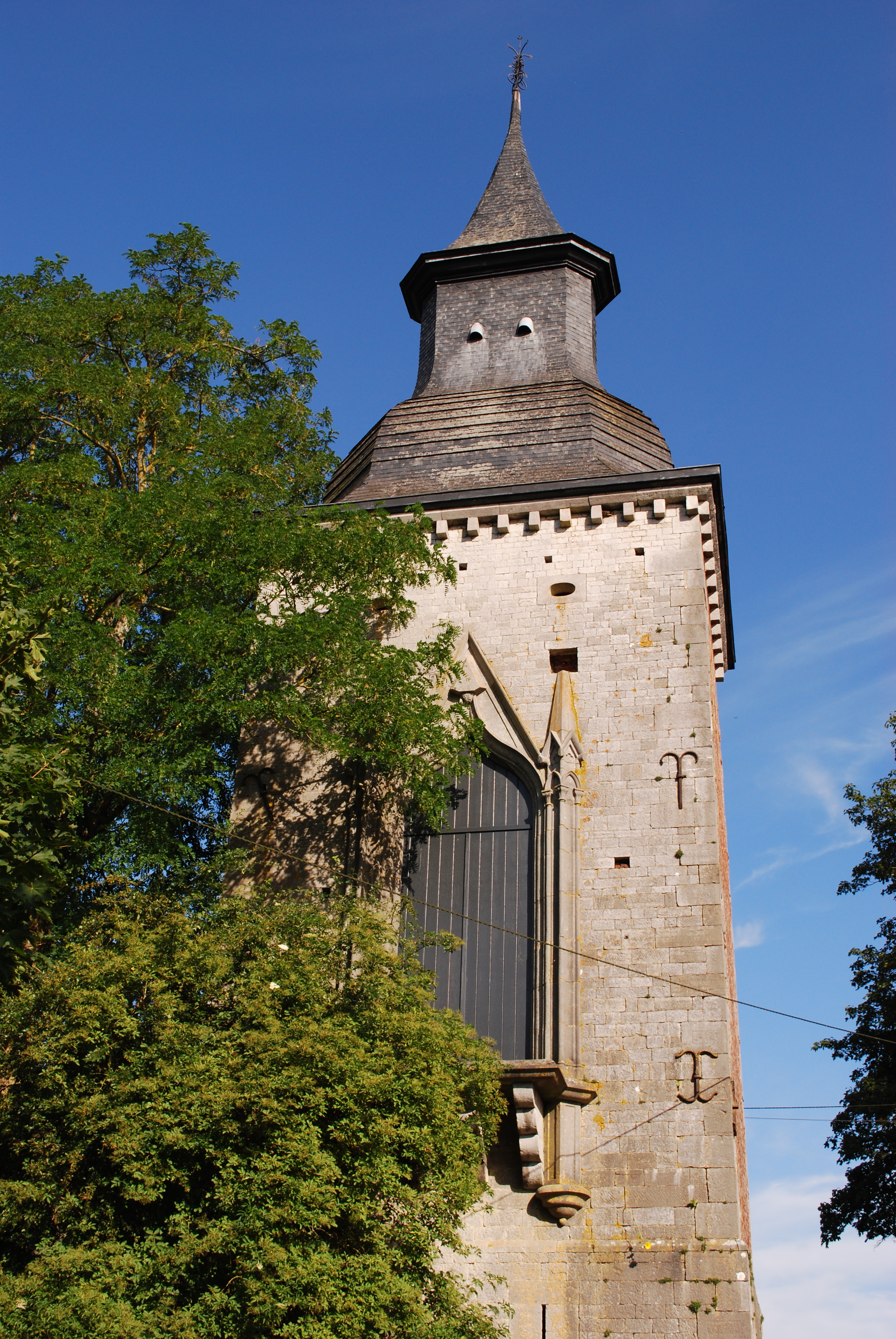 La tour, dite "de Justice", à Grandhan (Durbuy).